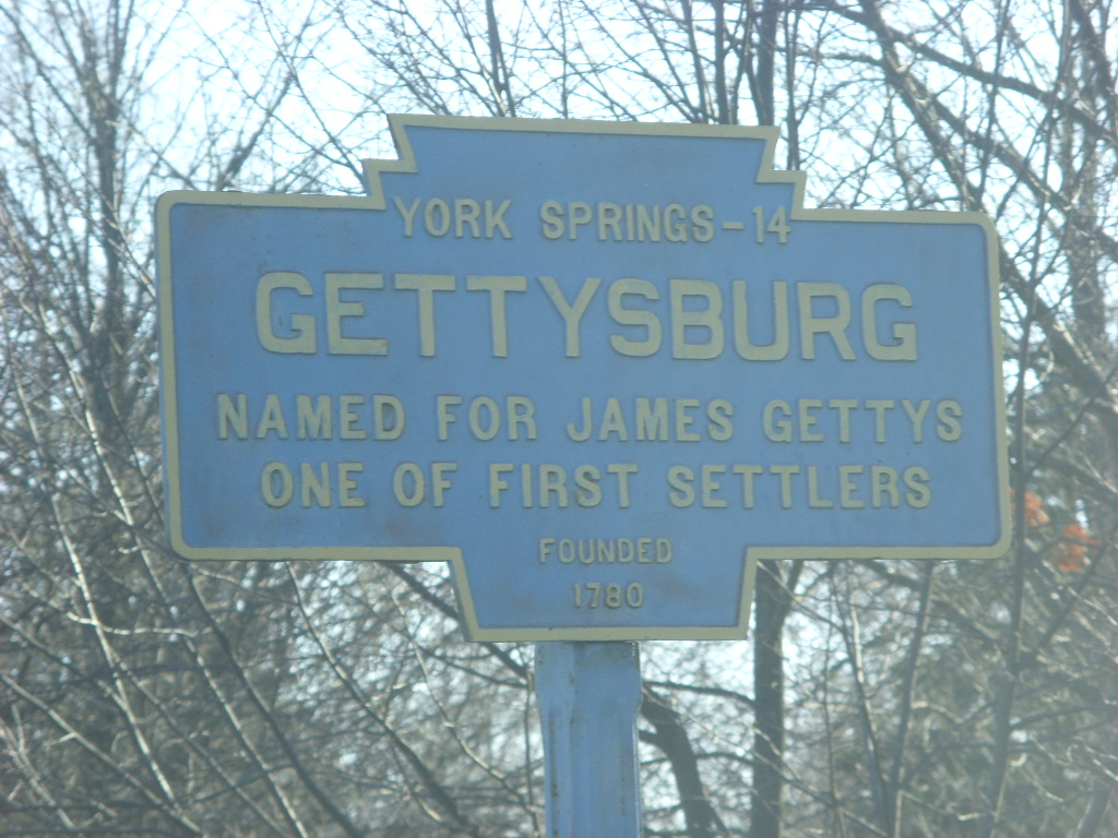 Pennsylvania Keystone Marker for Gettysburg, Pennsylvania